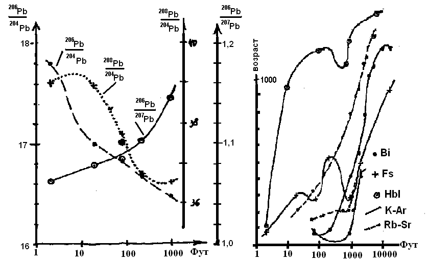 Зависимость возраста минералов, определённого разными методами, от расстояния до контакта интрузии в зоне контактового метаморфизма.